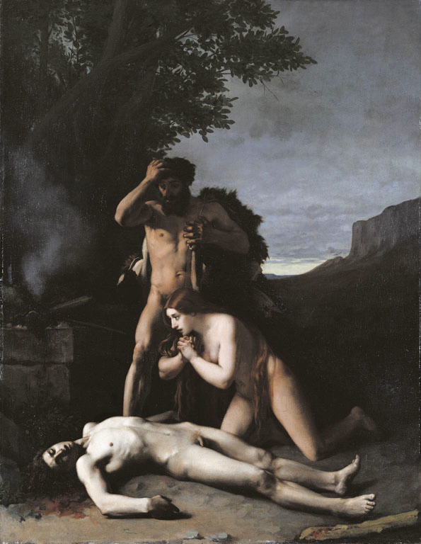 Jean-Jacques Henner, Adam et Eve découvrant le corps d’Abel, 1858, Paris, École Nationale Supérieure des Beaux-Arts